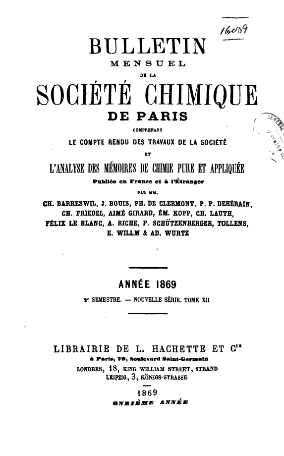 Page couverture du "Bulletin mensuel de la société chimique de Paris", 2e semestre, 1869